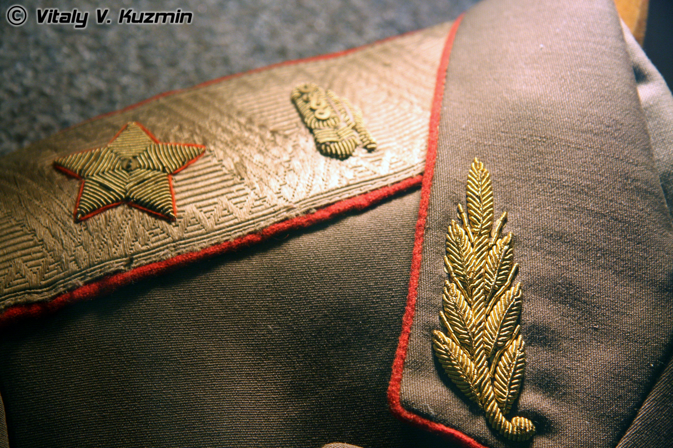 Китель М.Е. Катукова